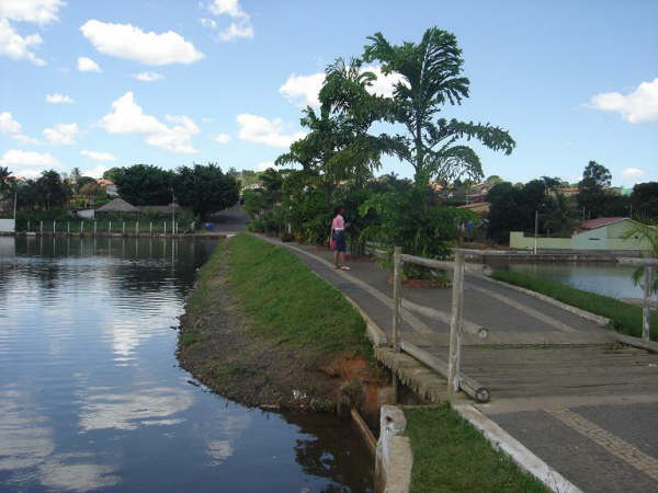 Represa do Monsenhor Souza, em Catalão, Goiás